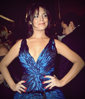 Camila Zárate